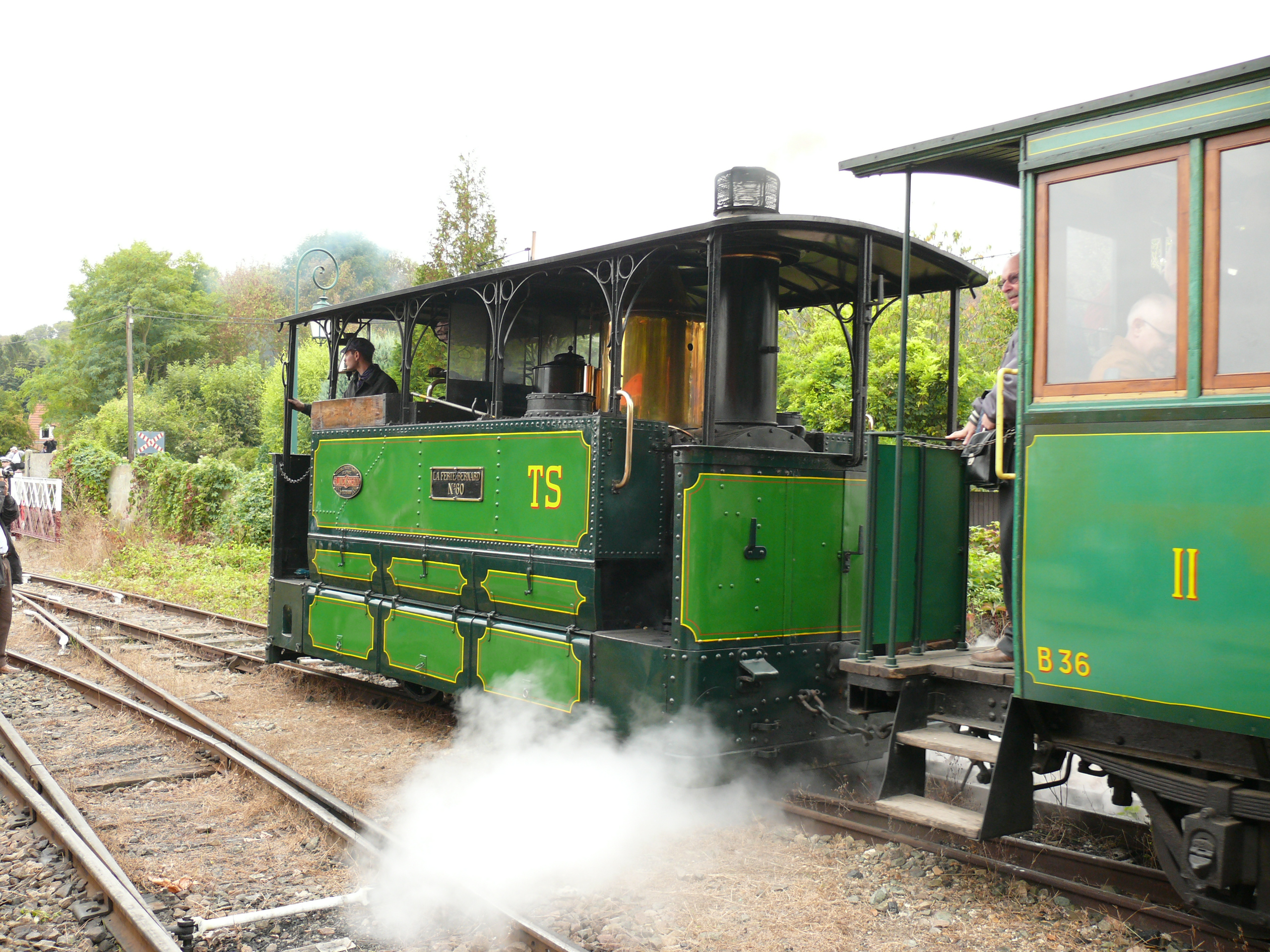 Rame des Tramways de la Sarthe (Locomotive Bicabine Blanc-Misseron N°60, remorque B36) restaurée et préservée par le Musée des tramways à vapeur et des chemins de fer secondaires français